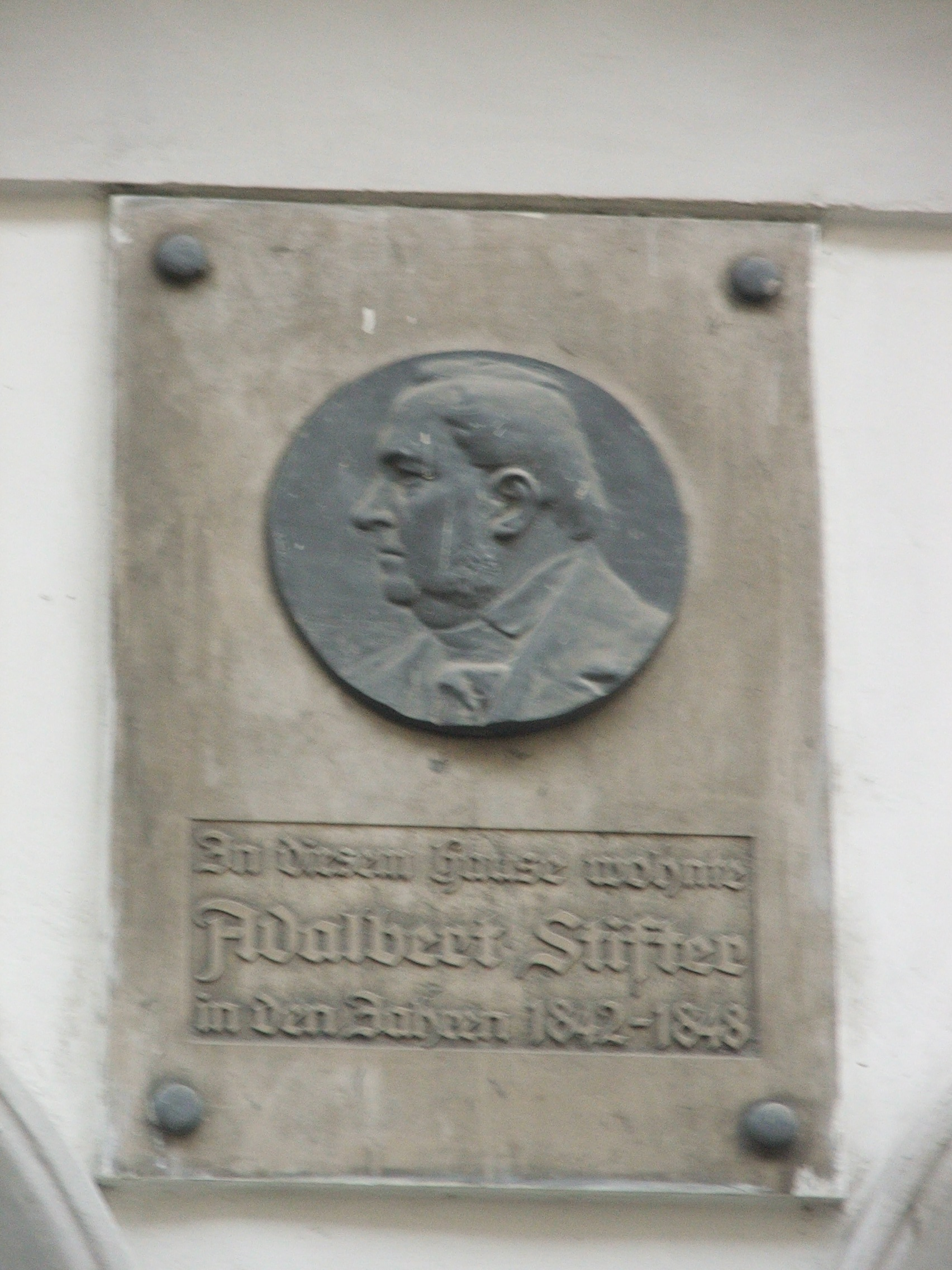 Adalbert Stifter, Vienna